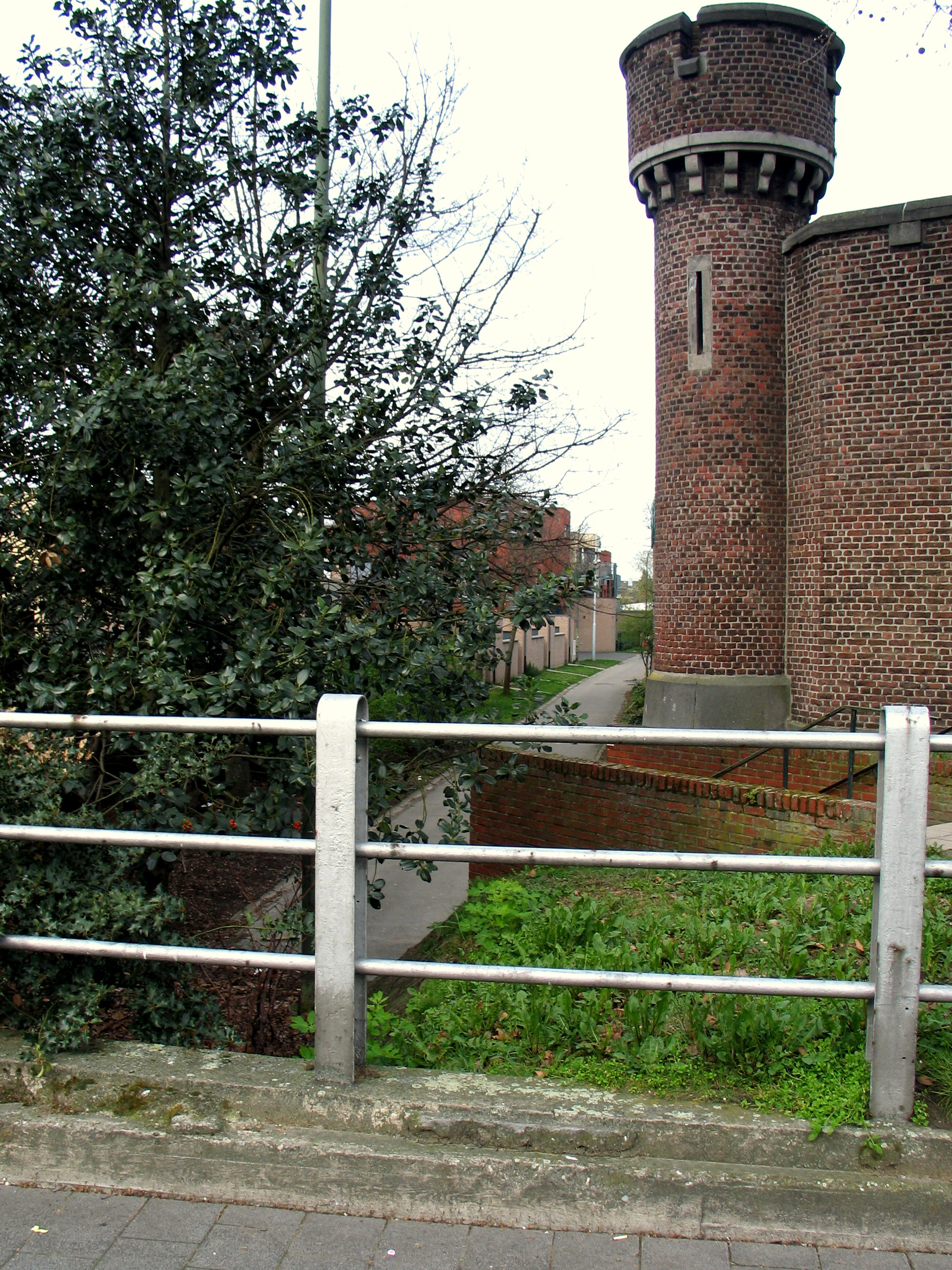 Koekerellenpad, deel van de bedding van de intussen verdwenen Nieuwe Demer te Hasselt, België